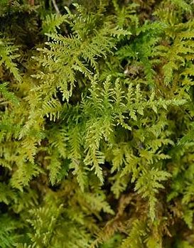 Bryophyte Thuidium tamariscinum